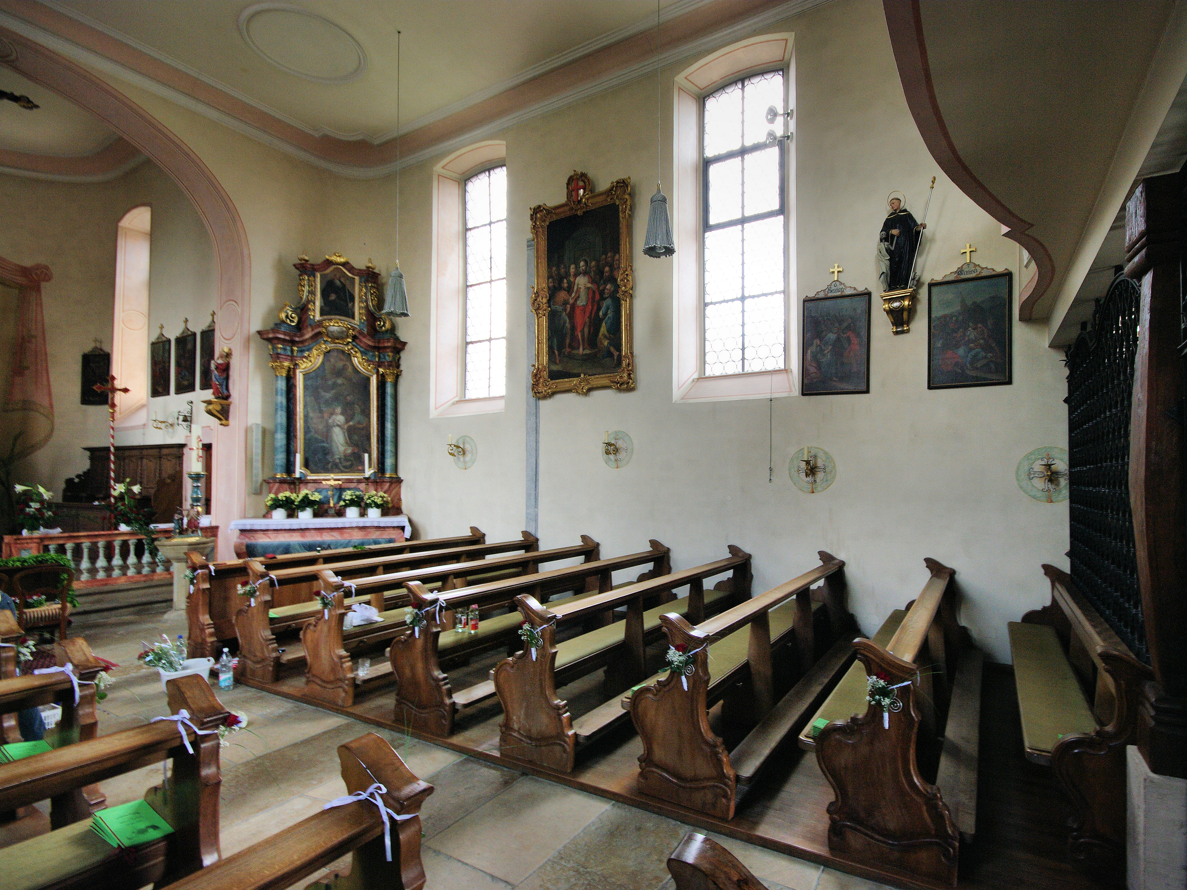 Pfarrkirche St. Thomas in Betzenhausen ein Stadtteil Freiburgs Die rechte Hälfte des Innenraums